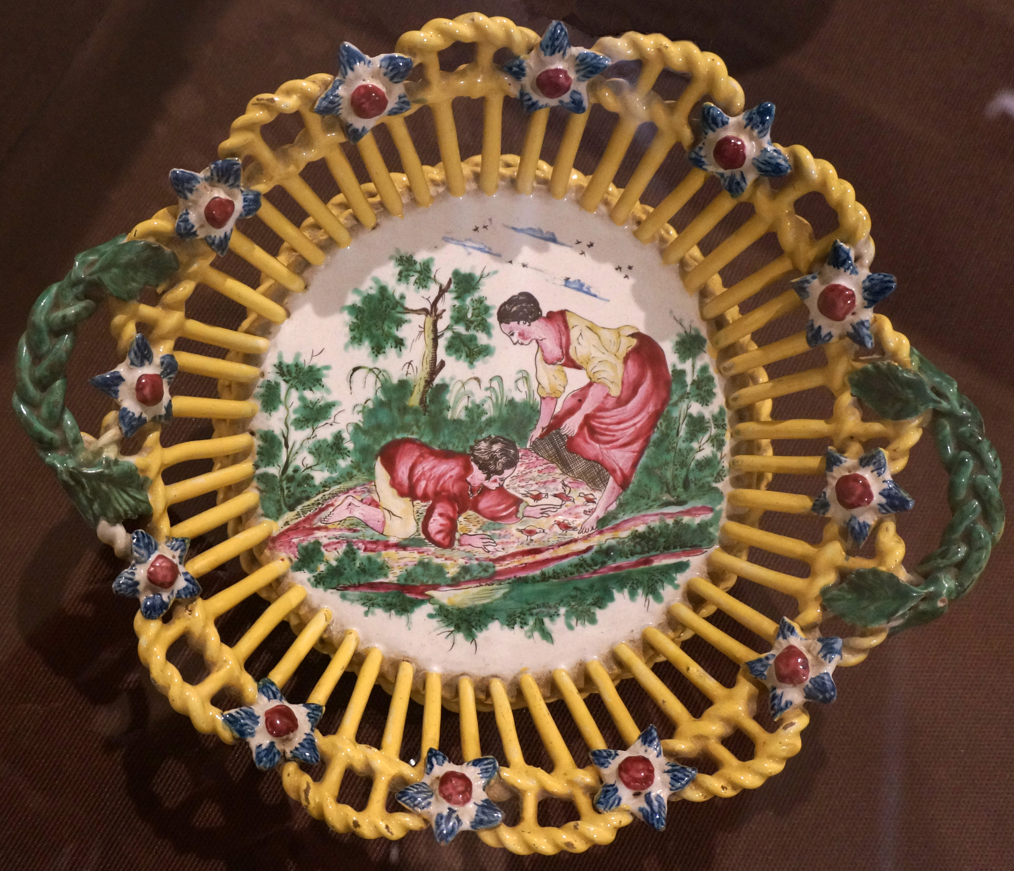 présenté au Musée d'art et d'archéologie de Laon.